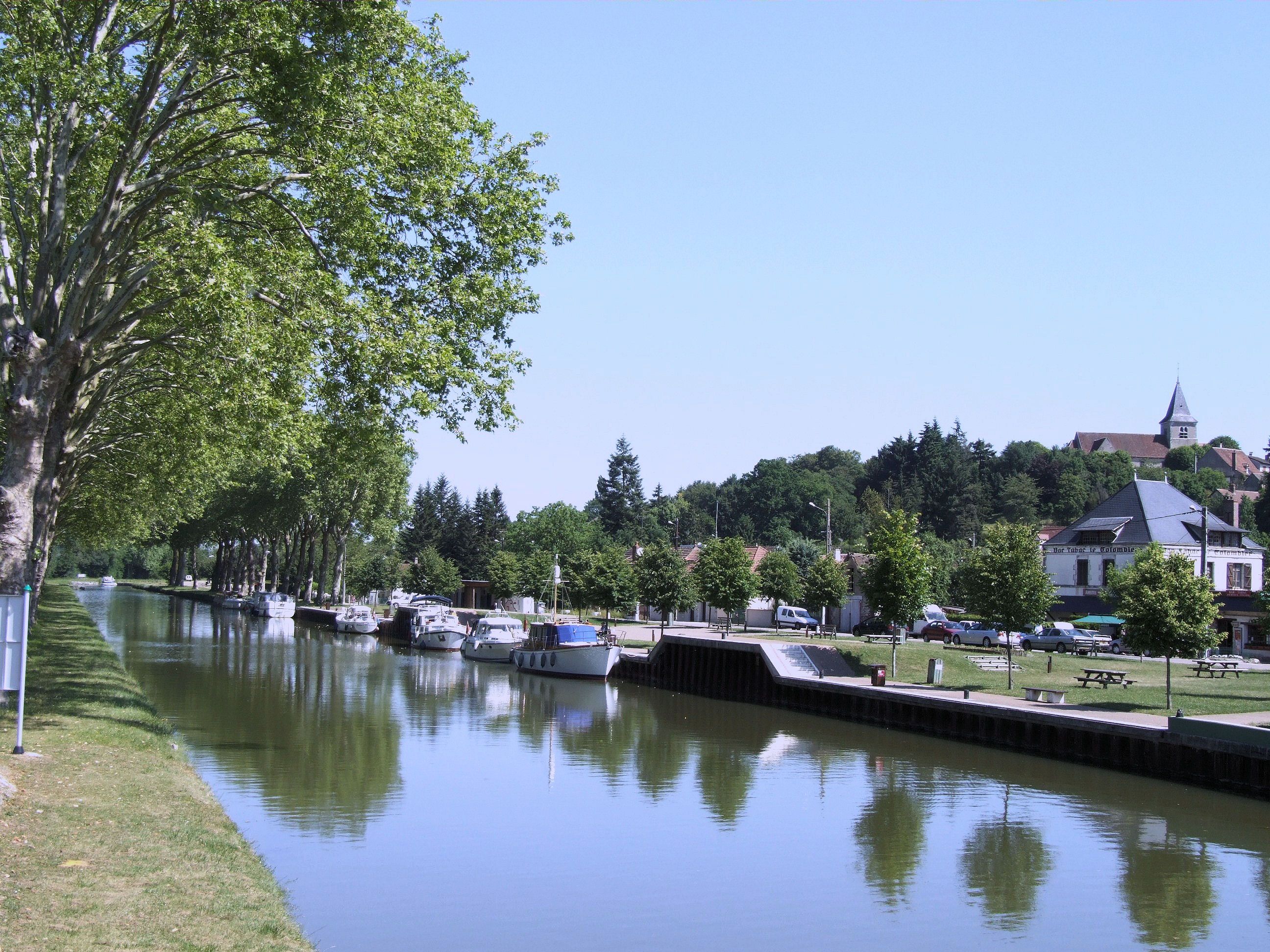 Rogny-les-Sept-Ecluses et le canal de Briare